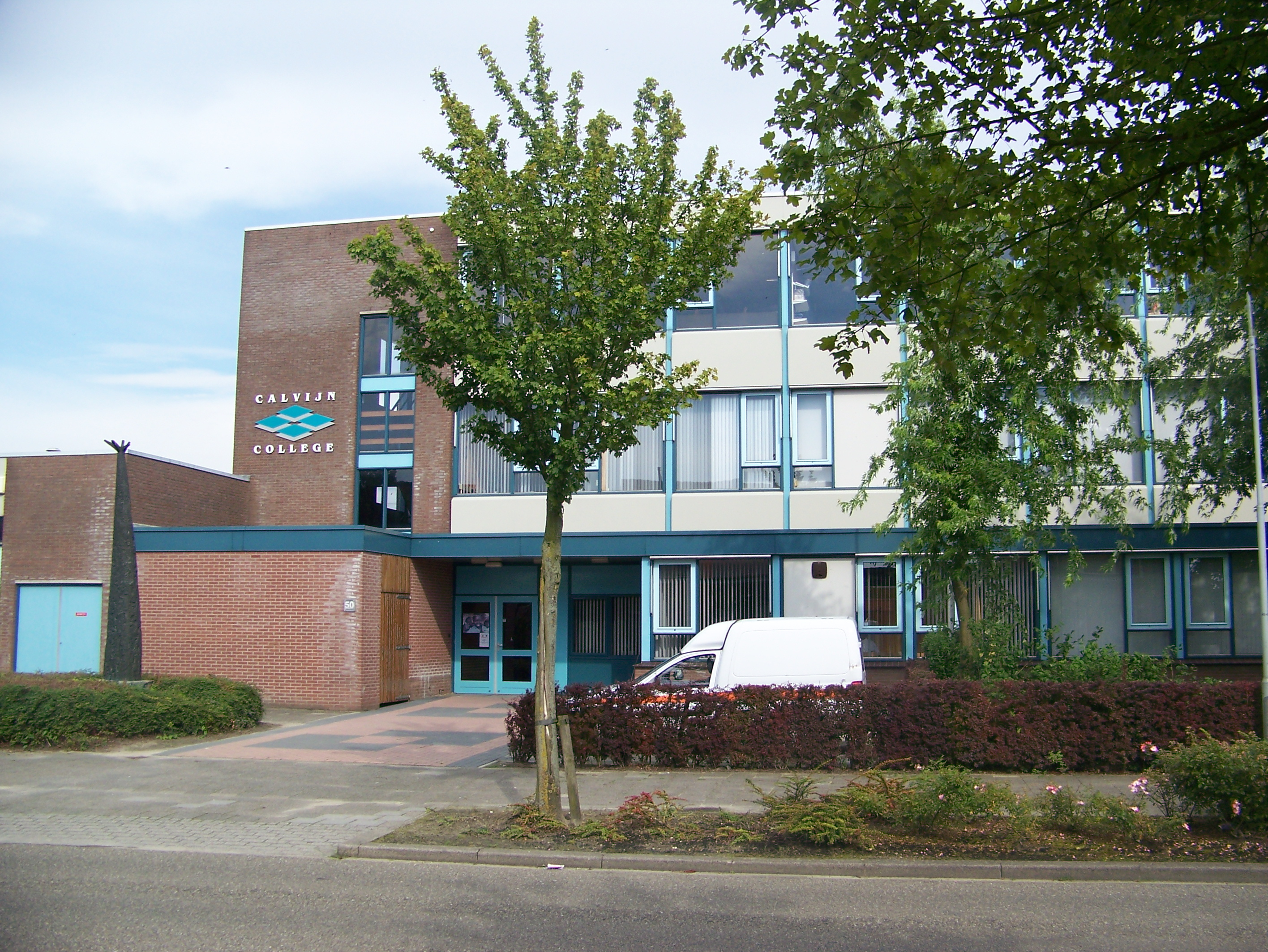 Calvijn College in Krabbendijke, The Netherlands